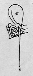 Tughraähnliche Handfeste (pençe) des Sancakbeys Iskender Husein Pascha